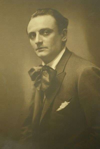 Traian GrozăvescuRomână: Traian Grozăvescu